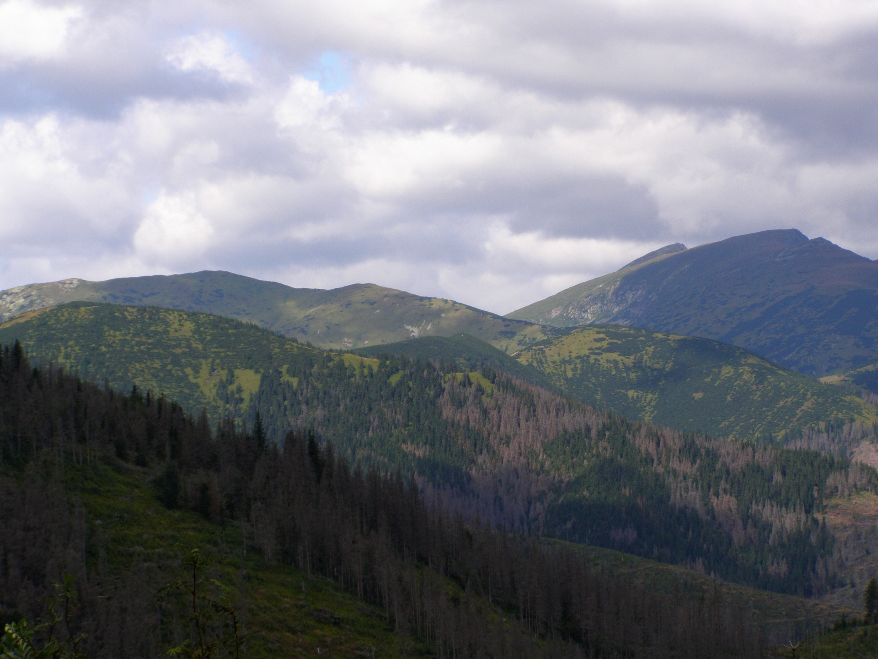 Nízké Tatry, Ďumbierské Tatry, pohled z úbočí vrcholu Jánov grúň (1388 m, Kráľovohoľské Tatry) na severozápad: vlevo uprostřed vrchol Rovienky (1602 m) , uprostřed zleva doprava Králička (1807 m), vpravo v pozadí Ďumbier (2043 m)